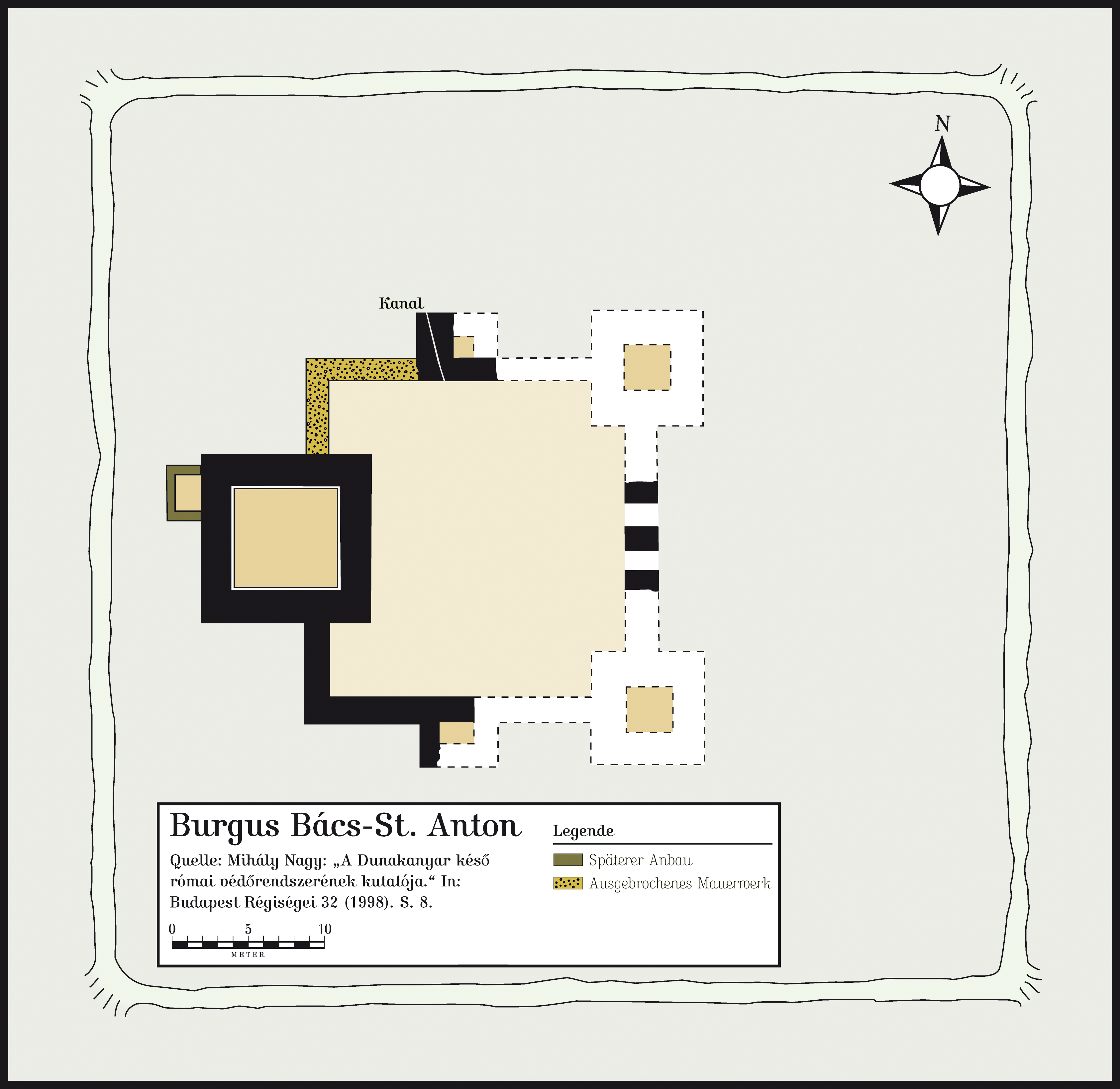 Der oberpannonische Burgus Bač-Bács, ein spätantiker römischer Ländeburgus im heutigen Serbien.